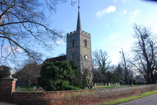 St Dunstan Church, Hunsdon.